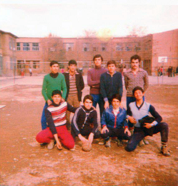 عده‌ای از دانش‌آموزان دبیرستان منصور تبریز در سال ۱۳۵۶ خورشیدی